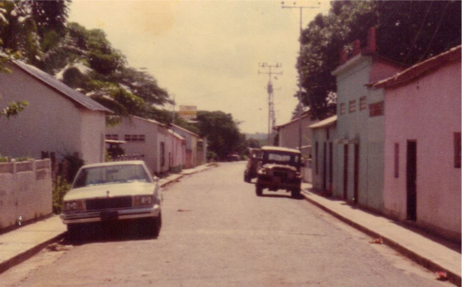 Historia